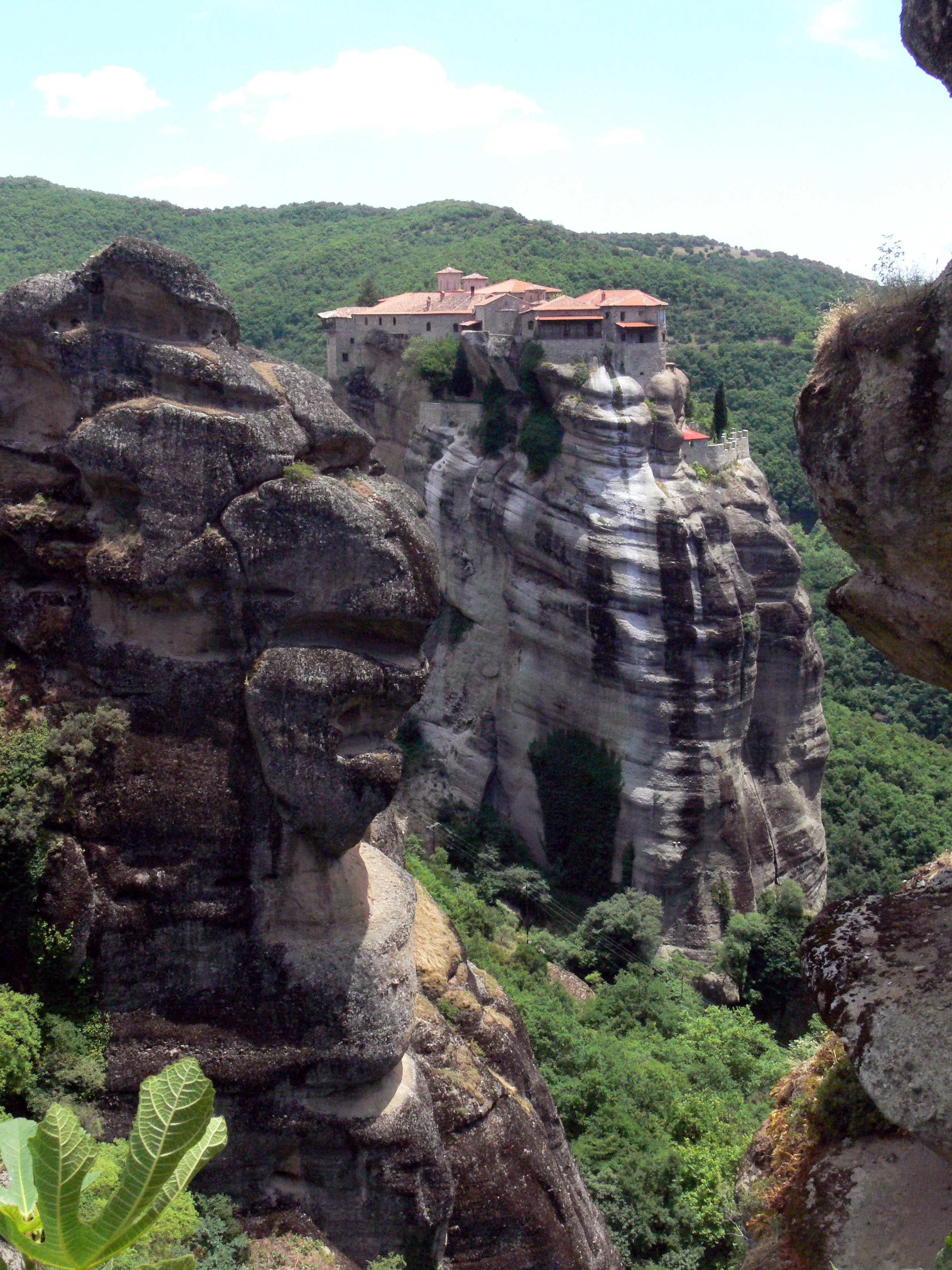 Meteora: Kloster Varlaam.